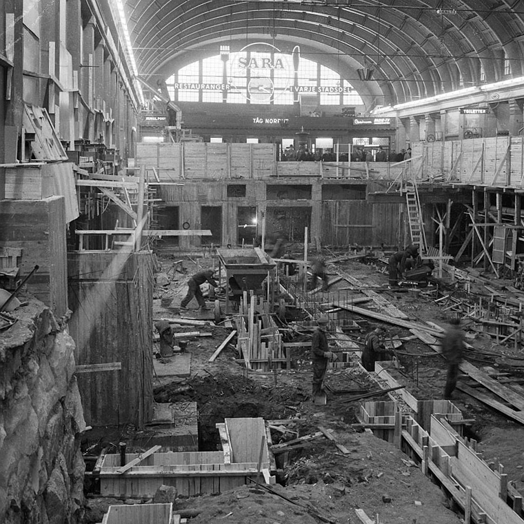 Byggnadsarbete pågår i Centralstationens stora hall